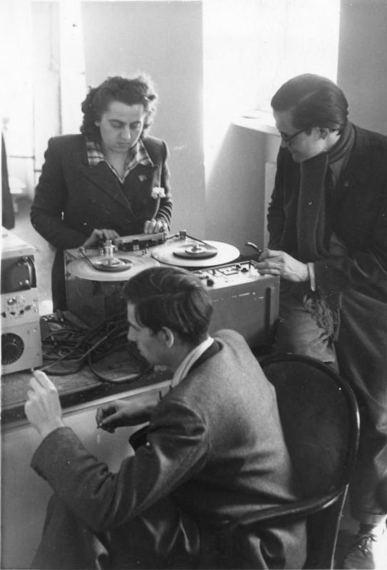 ADN-ZB/Illus-Heilig Beginn des Dessauer Millionenschieber-Prozesses. Am 24. April 1950 begann vor dem ersten Strafsenat des Obersten Gerichts der Deutschen Demokratischen Republik der Prozess gegen den ehemaligen Minister für Arbeit und Sozialwesen von Sachsen-Anhalt, Herwegen, und seine Mitangeklagten. Die Verhandlungen, die unter starker Teilnahme der werktätigen Bevölkerung im Landestheater Dessau stattfinden werden von der Vizepräsidentin des Obersten Gerichtshofes, Hilde Benjamin, geführt. Dr. Leo Herwegen, ehem. Minister für Arbeit und Sozialwesen in Sachsen Anhalt; Prof. Dr. Willi Brundert, ehem. stellvertretender Wirtschaftsminister von Sachsen-Anhalt; Dipl.-Ing. Hermann Müller, ehem. Direktor der Deutschen Continentalen Gasgesellschaft in Dessau; Dr. Leopold Kaatz, ehem. Direktor der Dessauer Zuckerraffinerie und Präsident der Industrie und Handelskammer in Dessau; Ernst Simon, ehem. Landgerichtsdirektor in Dessau und später juristischer Hilfsarbeiter der Deutschen Continentalen Gasgesellschaft; Paul Heil, ehem. Rechtsanwalt und Notar; Ernst Pauli, ehem. Wirtschaftsbeauftragter beim Oberbürgermeister der Stadt Dessau und gleichzeitig Leiter der Abteilung Industrie bei der Industrie und Handelskammer in Dessau; Heinrich Scharf, ehem. Mitglied des Direktoriums der Landeskreditbank Sachsen-Anhalt, werden angeklagt, die Überführung des Konzerns der Deutschen Continentalen Gasgesellschaft in das Eigentum des Deutschen Volkes planmäßig sabotiert zu haben. Gegen den ehem. Direktor der Deutsche Continentalen Gasgesellschaft Friedrich Methfessel, der sich durch die Flucht nach Westdeutschland vorläufig der Verantwortung entzogen hat, wird in Abwesenheit verhandelt. UBz: Der Kommentator des Berliner Rundfunks, Karl Eduard von Schnitzler überwacht die Sendung direkt vor dem Gerichtssaal 1. Mai 1950 6318-50